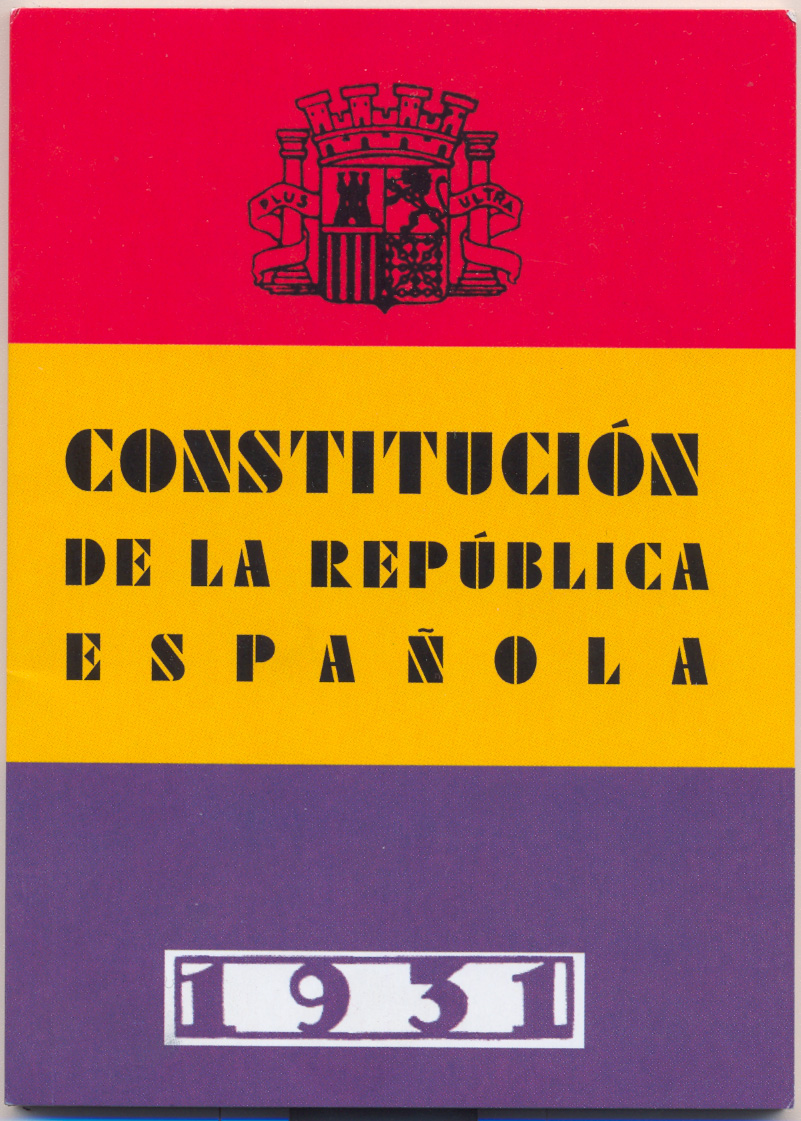 Portada del libro de la Constitución de la República Española, 1931